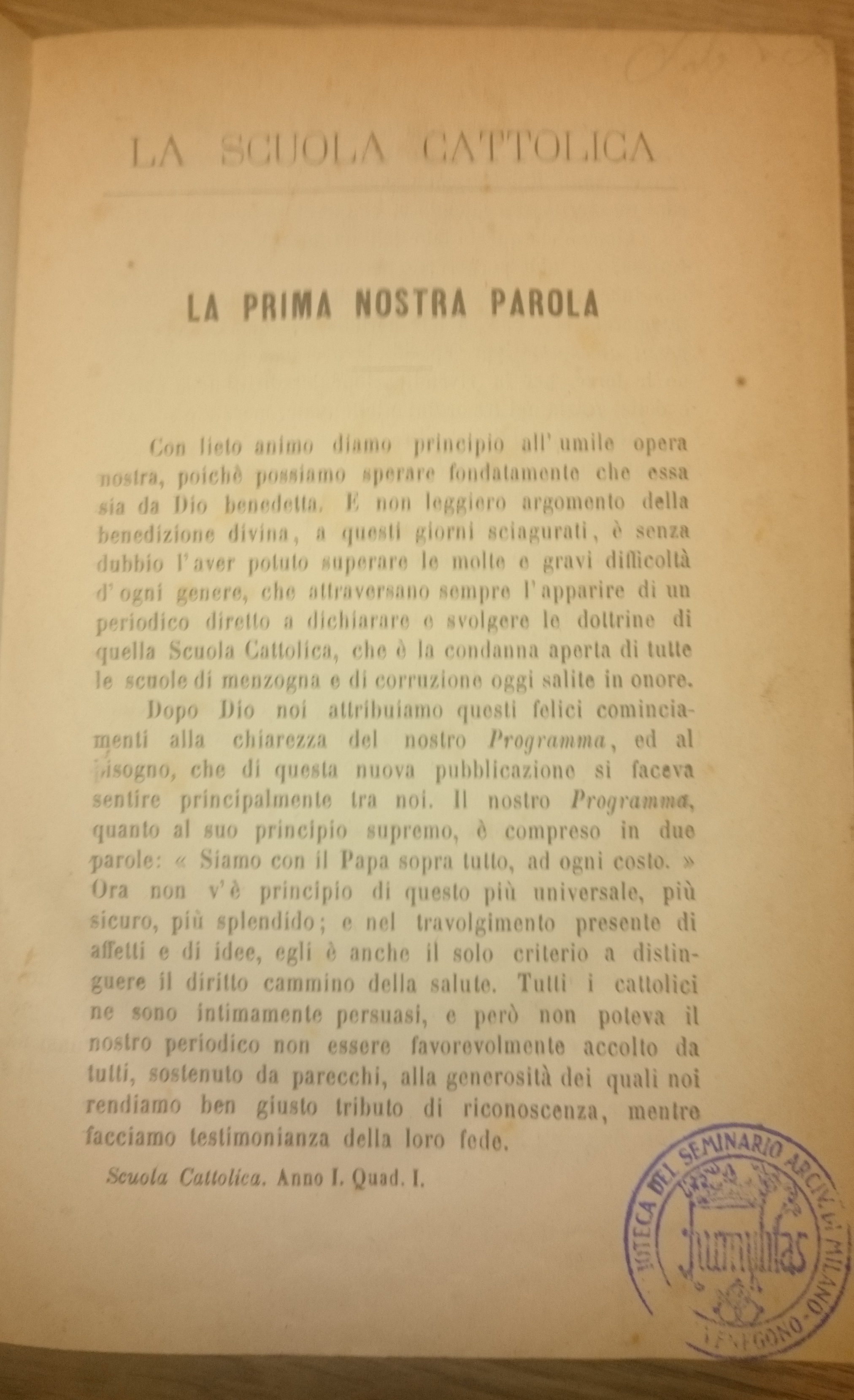 Prima pagina della Scuola Cattolica del 1873